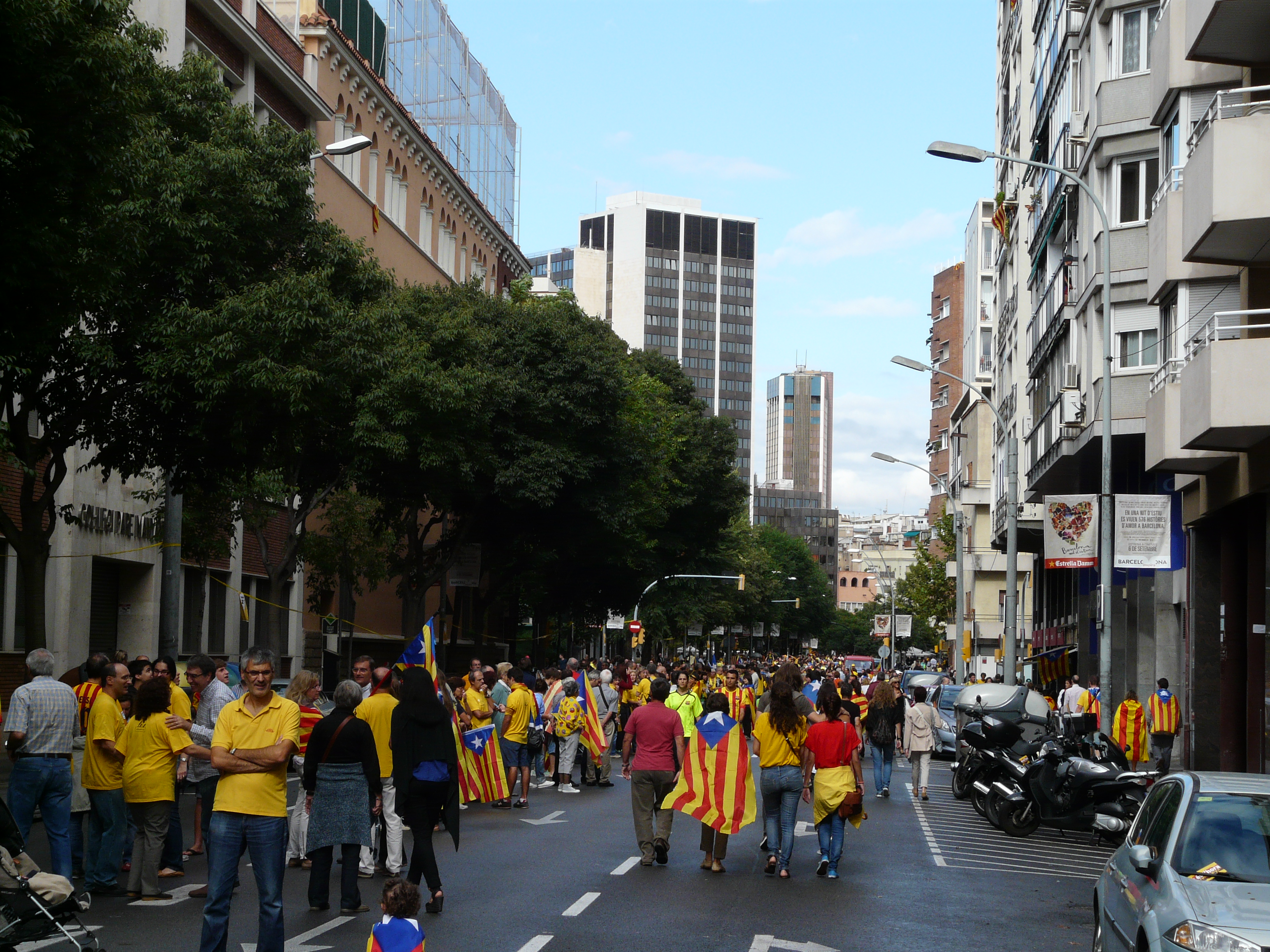 Via Catalana per la Independència. Abans, durant i després de la Via, a Barcelona i el Baix Llobregat.